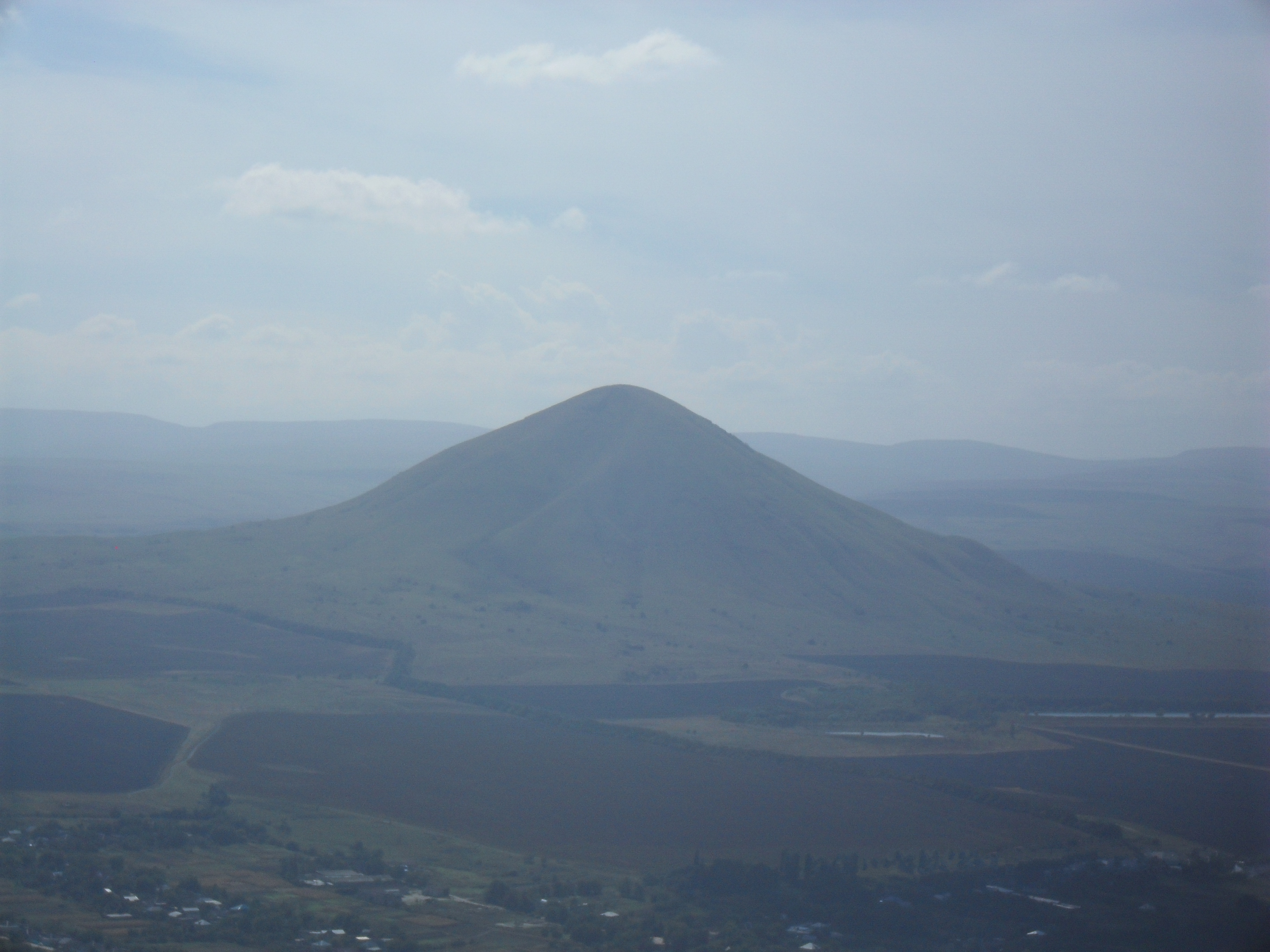 Гора Джуца